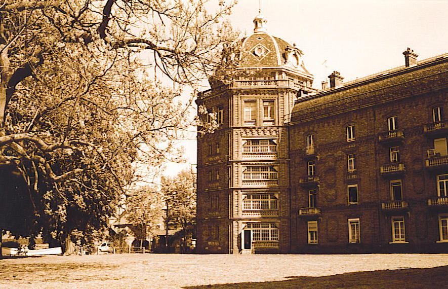 De Familistère te Guise, hoektoren aan de achterzijde van de linkervleugel - eigen foto - april 2004